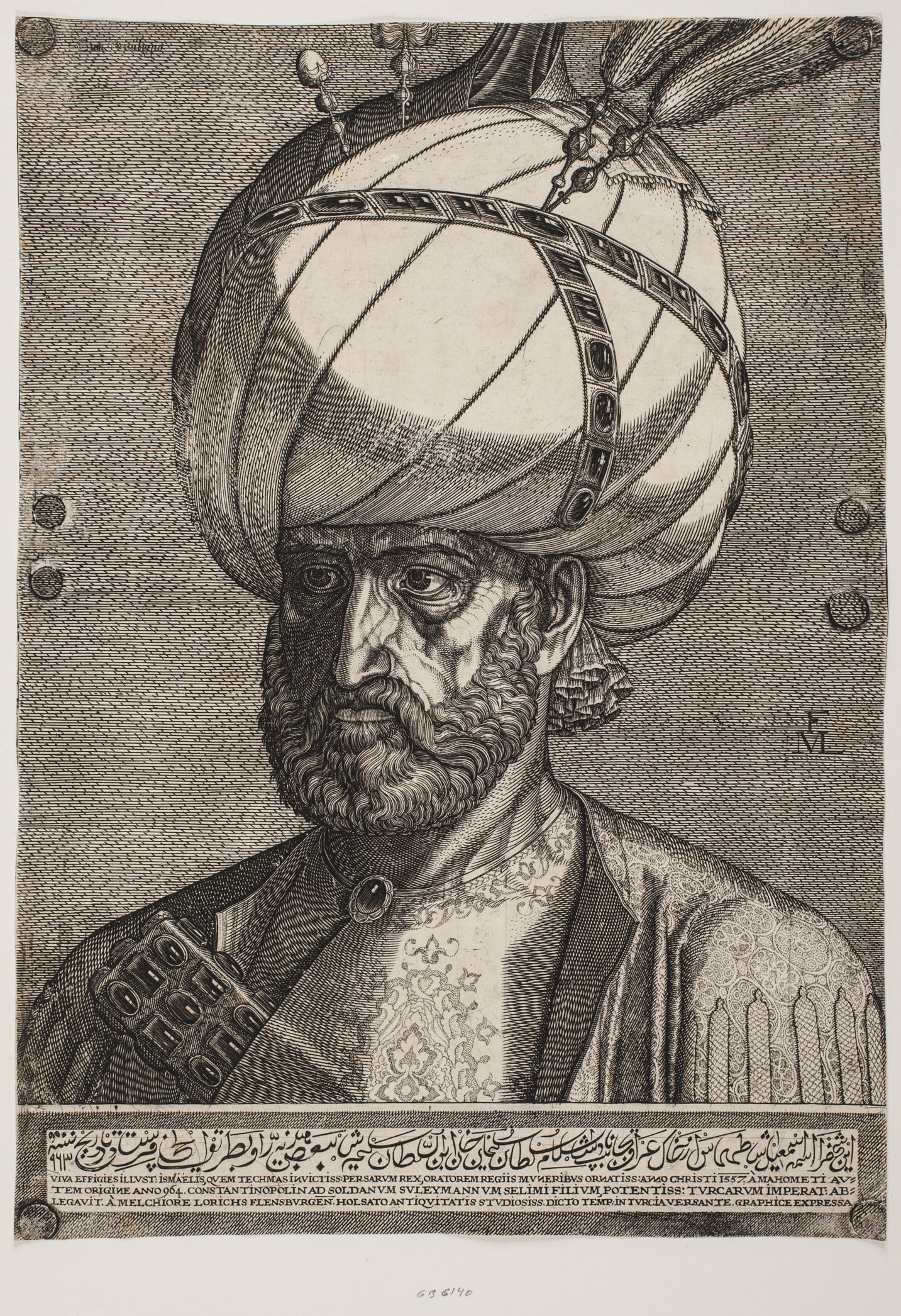 Melchior Lorck (1527-1626), Fyrst Ismael, persisk gesandt, (1562)